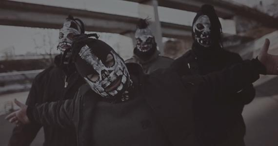 Videoausschnitt aus „D.N.A.“